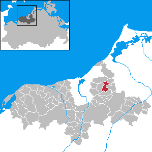 Poppendorf in Mecklenburg-Western Pomerania - District Bad Doberan